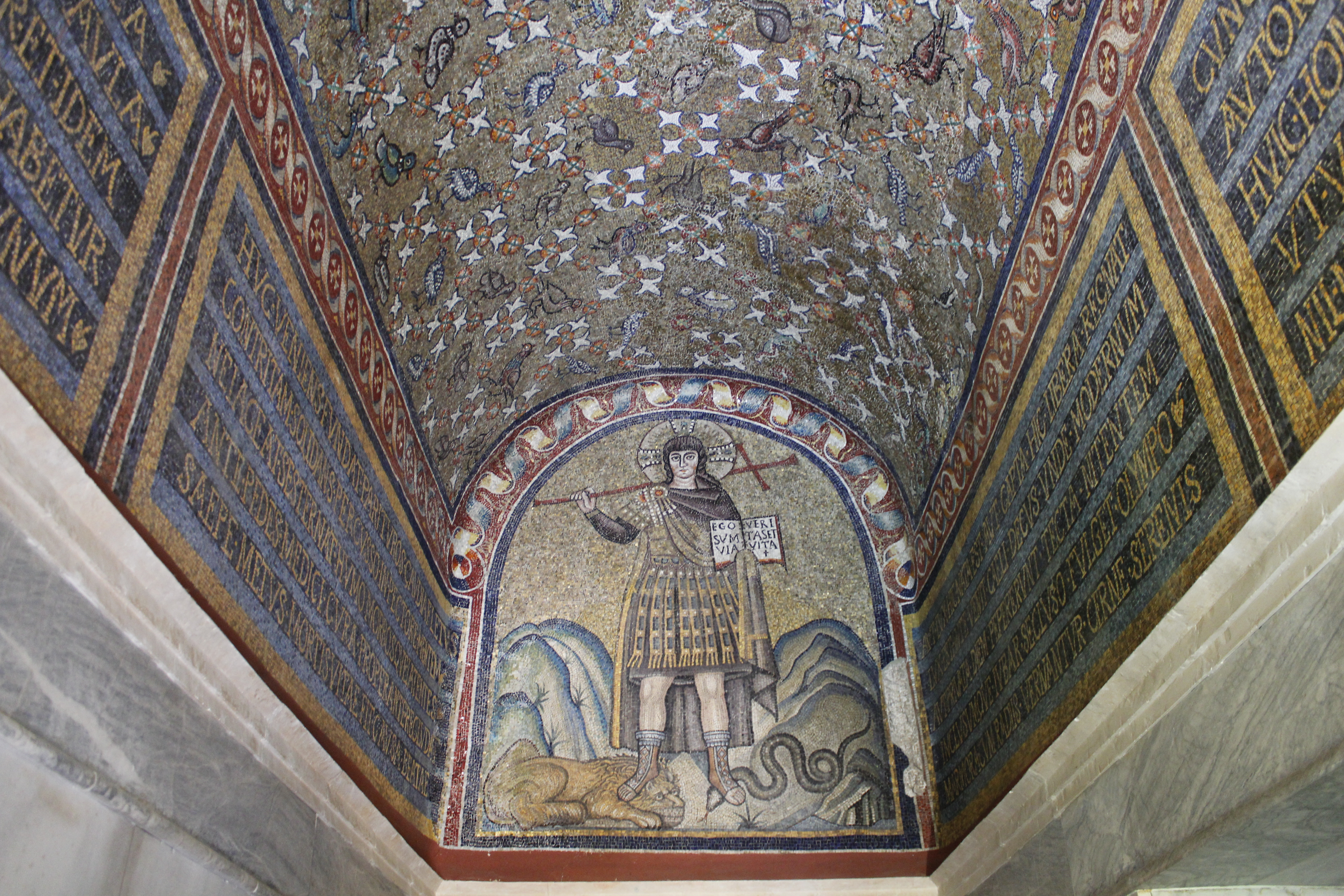 Cappella arcivescovile, Ravenna